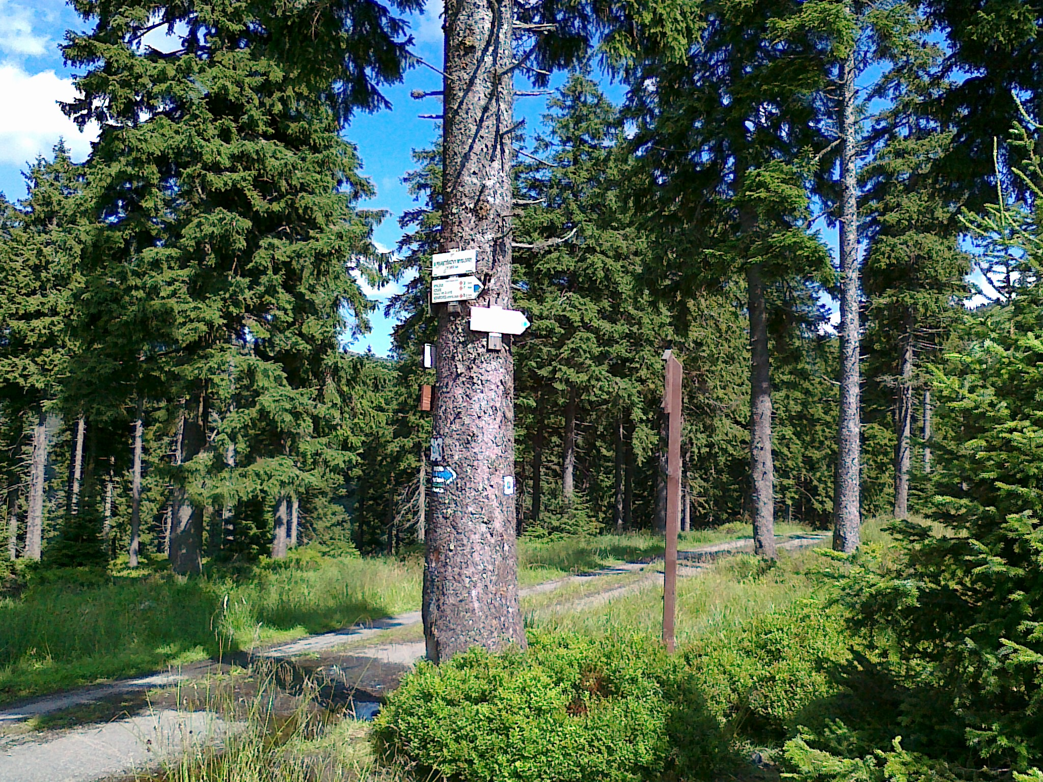 Skrzyżowanie szlaków o nazwie U Františkovy muslivny